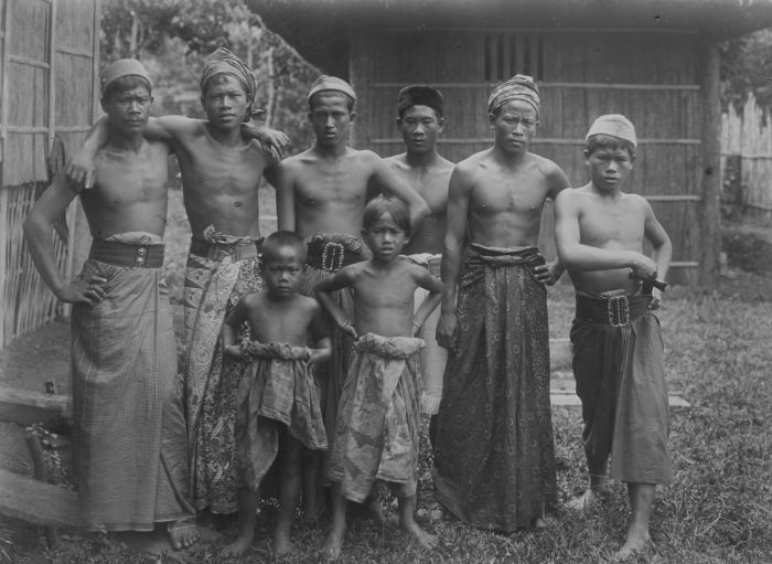 foto. Portret van een groep mannen en kinderen uit Negeribatin in de Lampongse districten